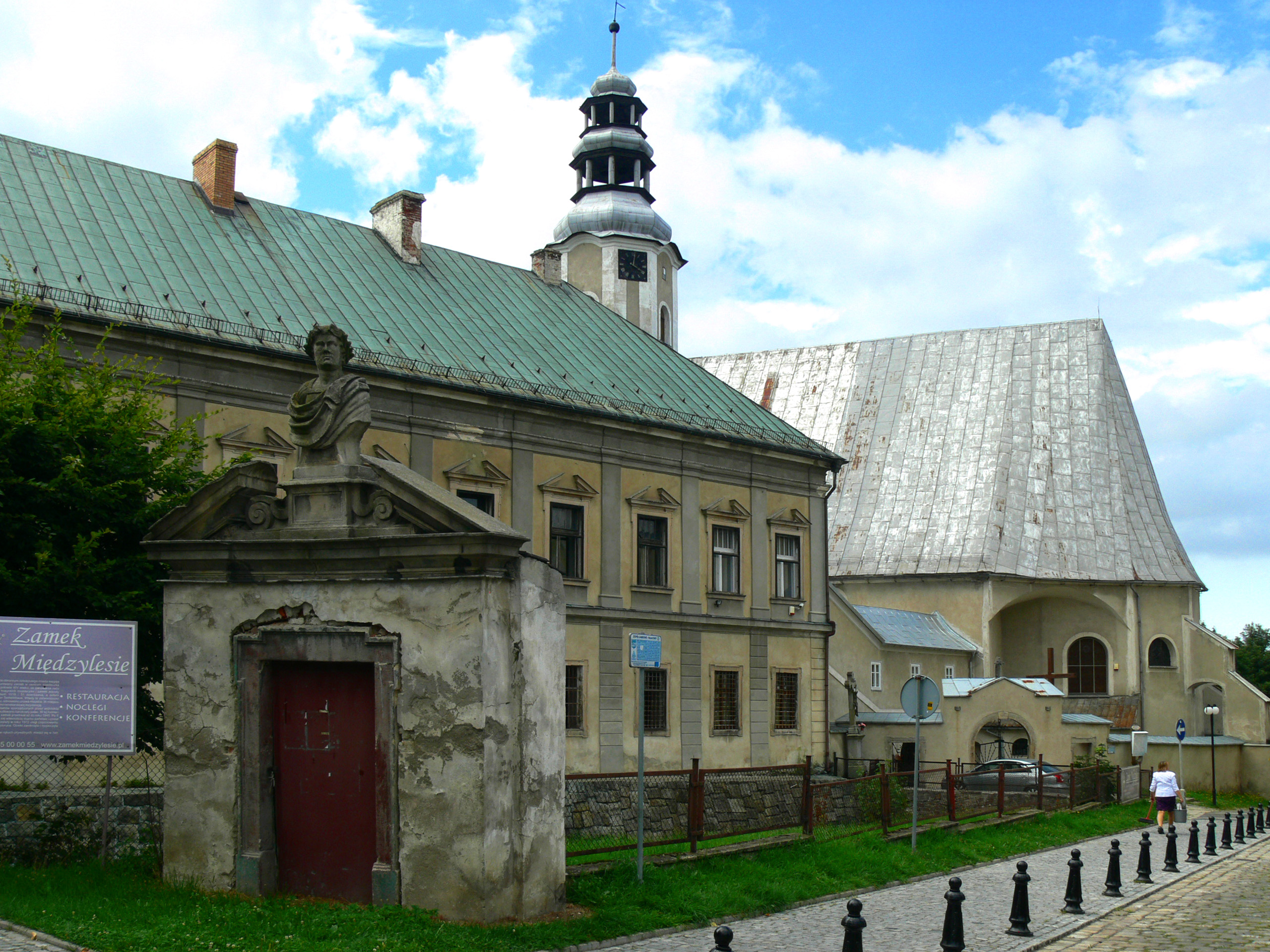 Międzylesie, zamek